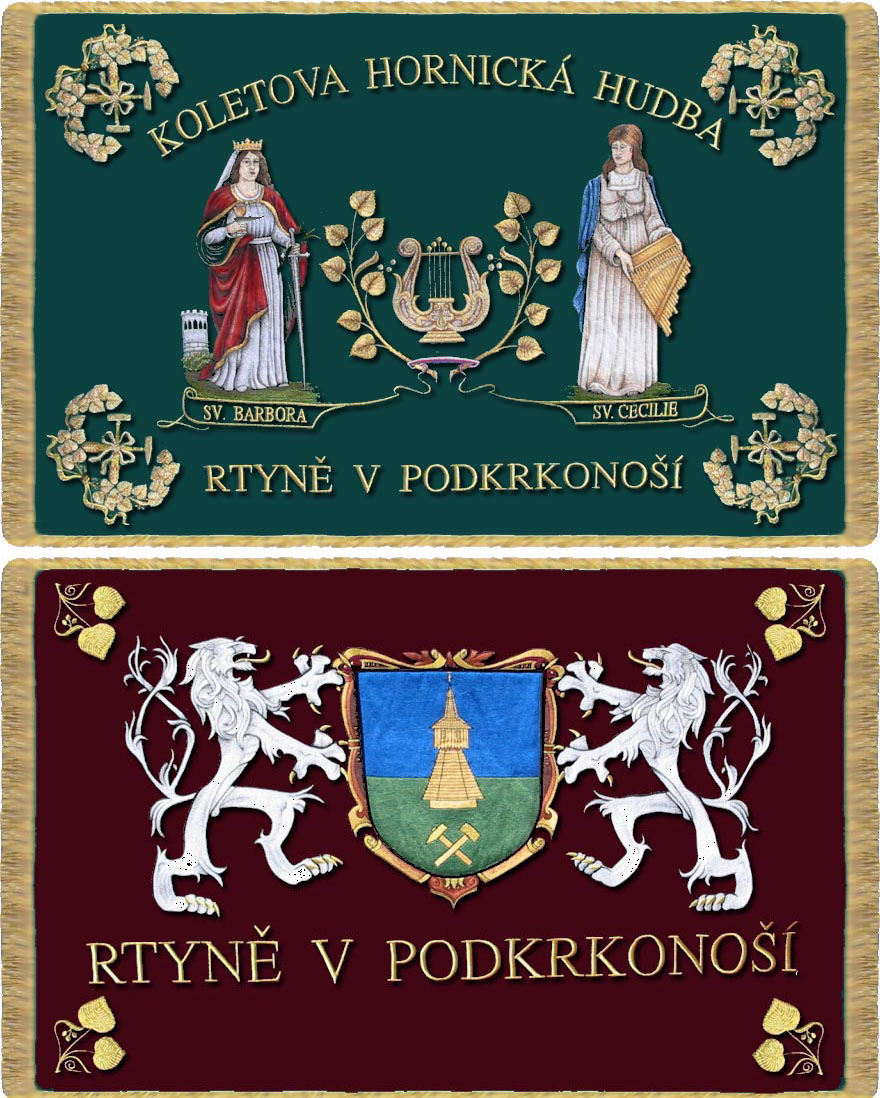 Vlajka KHH